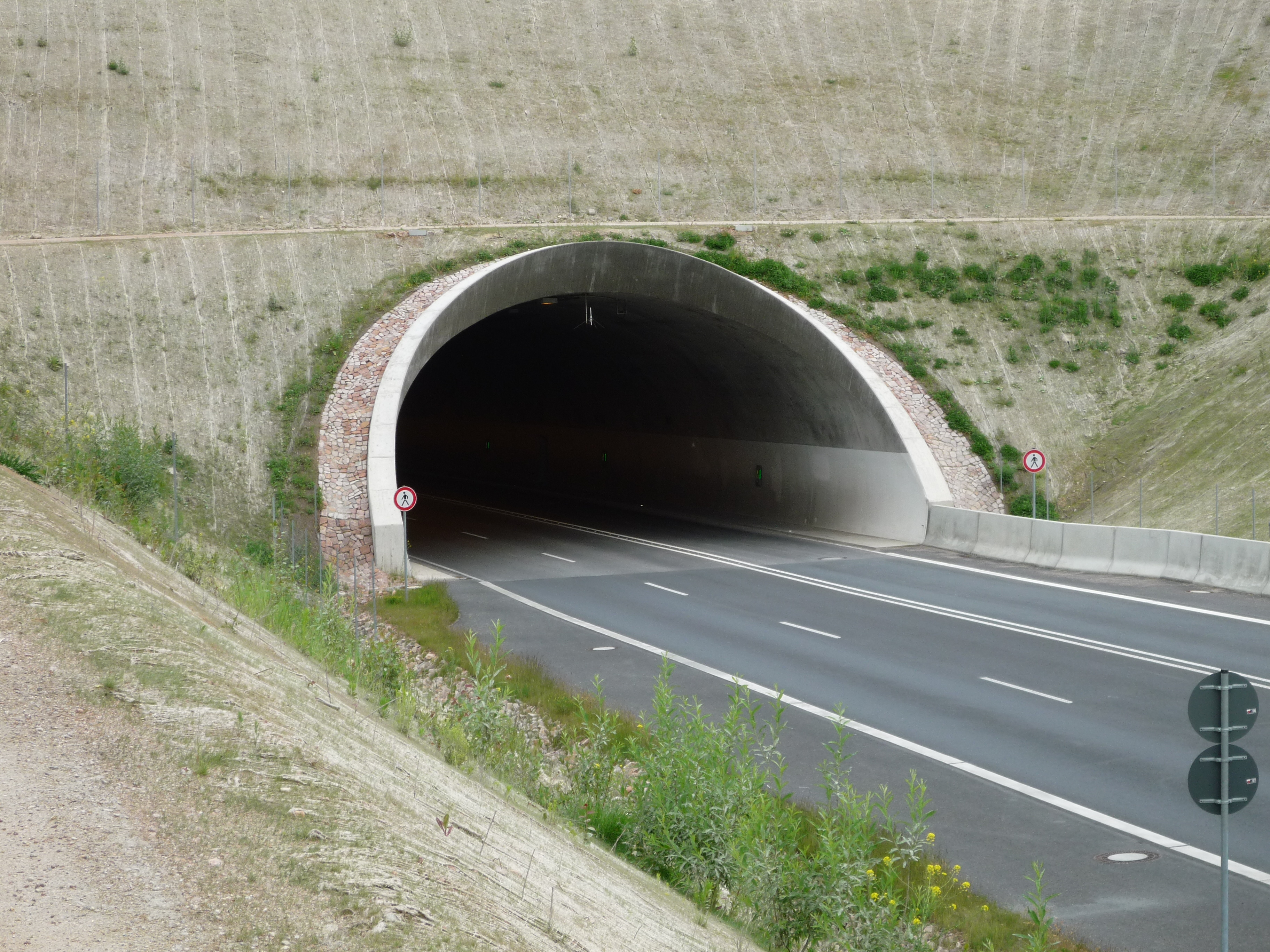 Die westliche Einfahrt des Schottenbergtunnels